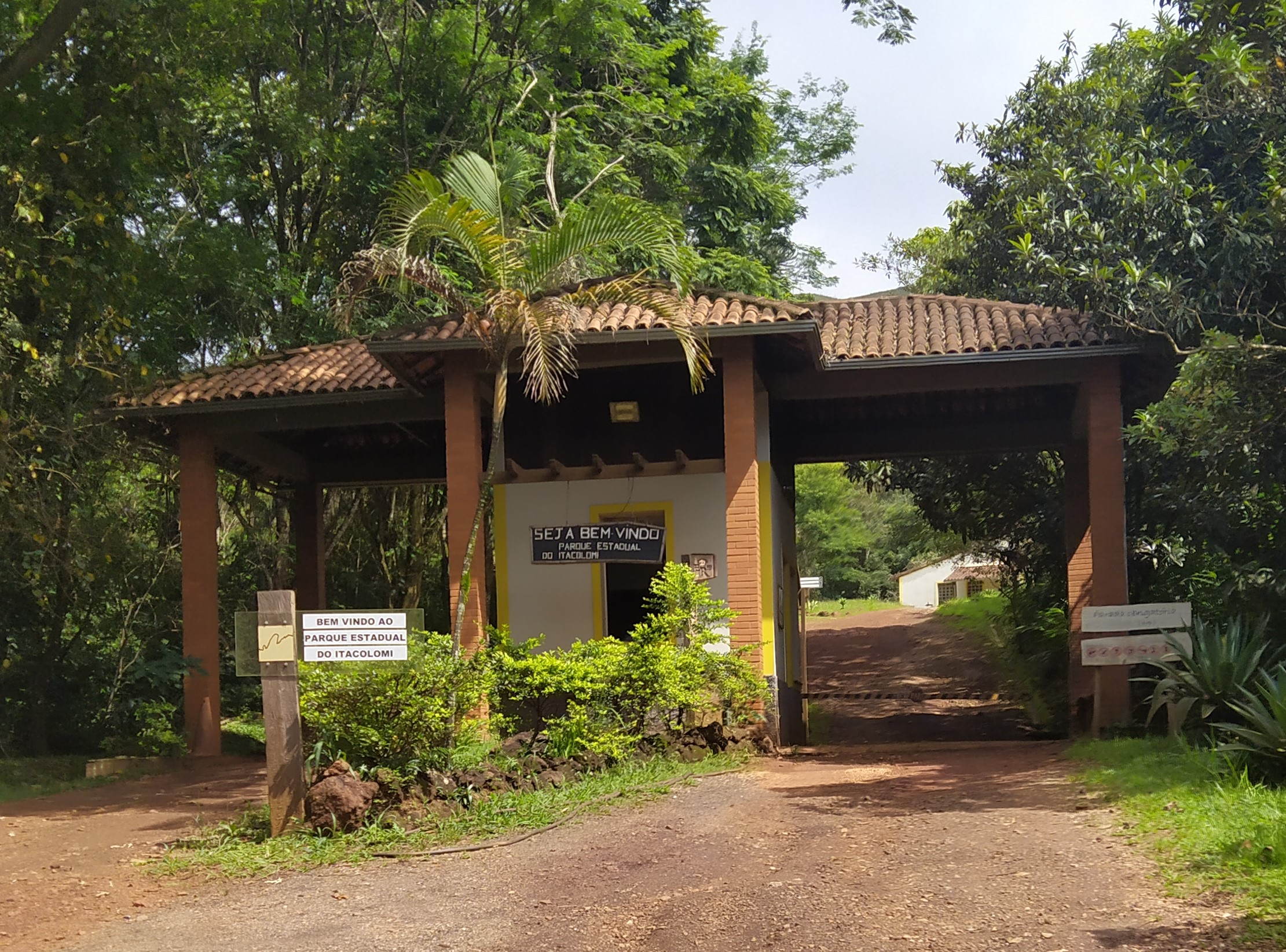 Parque Estadual do Itacolomi de nível Estadual, localizado (a) em Mariana (MG), Ouro Preto (MG)